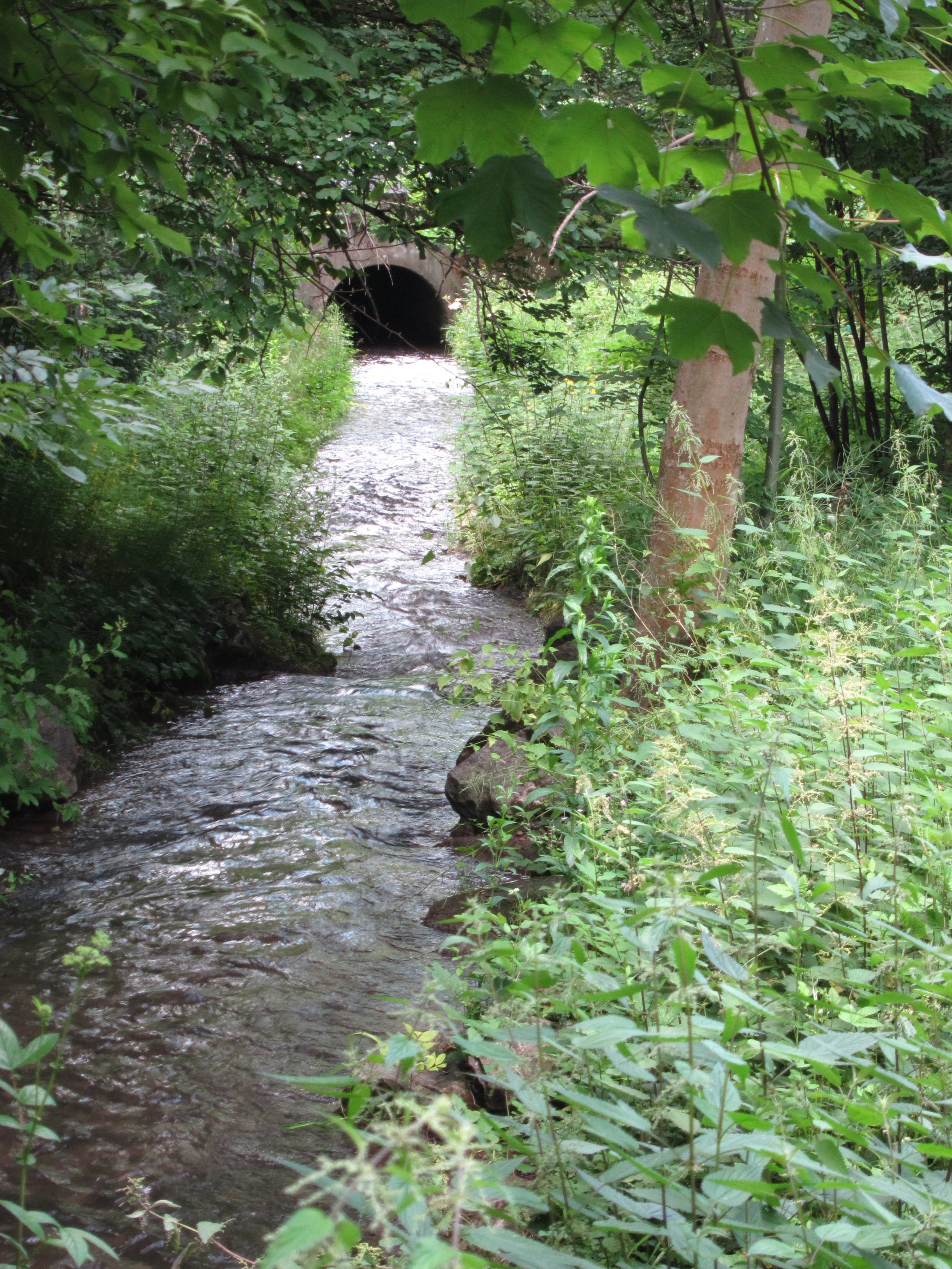 Hachinger Bach im Ostpark vor der Heinrich-Wieland-Straße